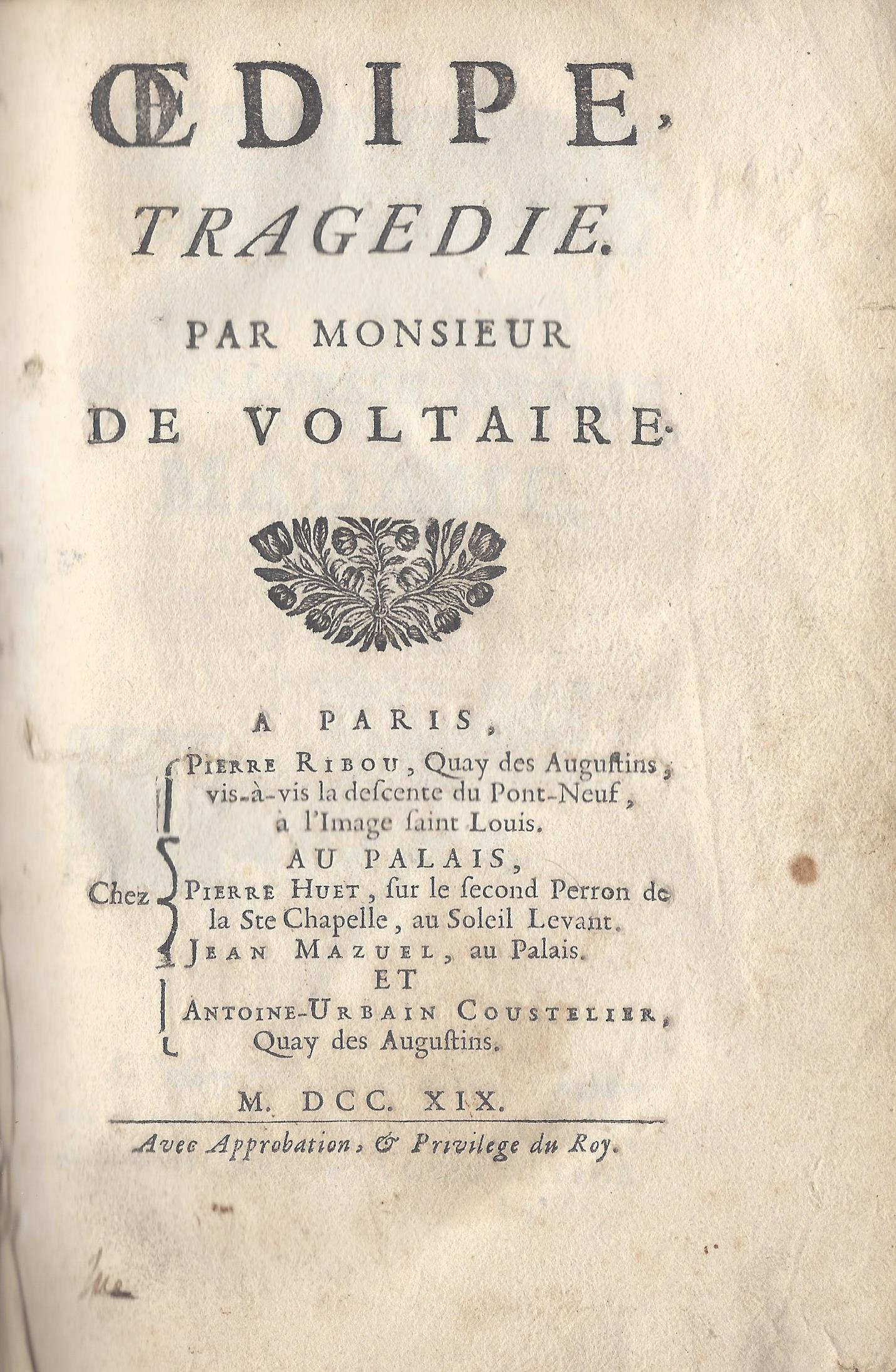 Titelseite der ersten Buchausgabe des Oedipe von Voltaire Ribou und Huet, Paris 1719. Scan von einem eigenen Exemplar des Typ B.